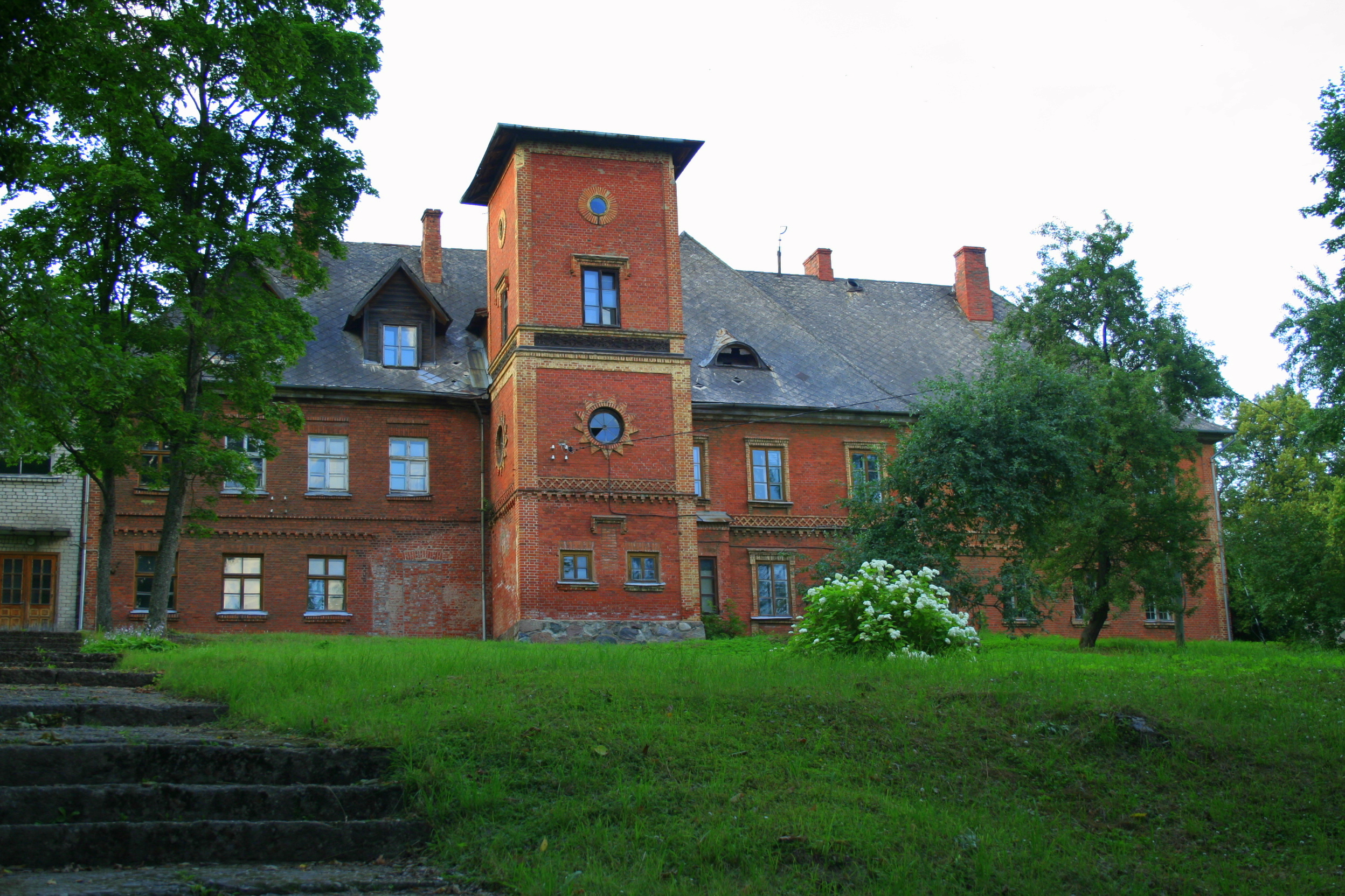 Sarkanā pils, Gulbene, Parka iela 10